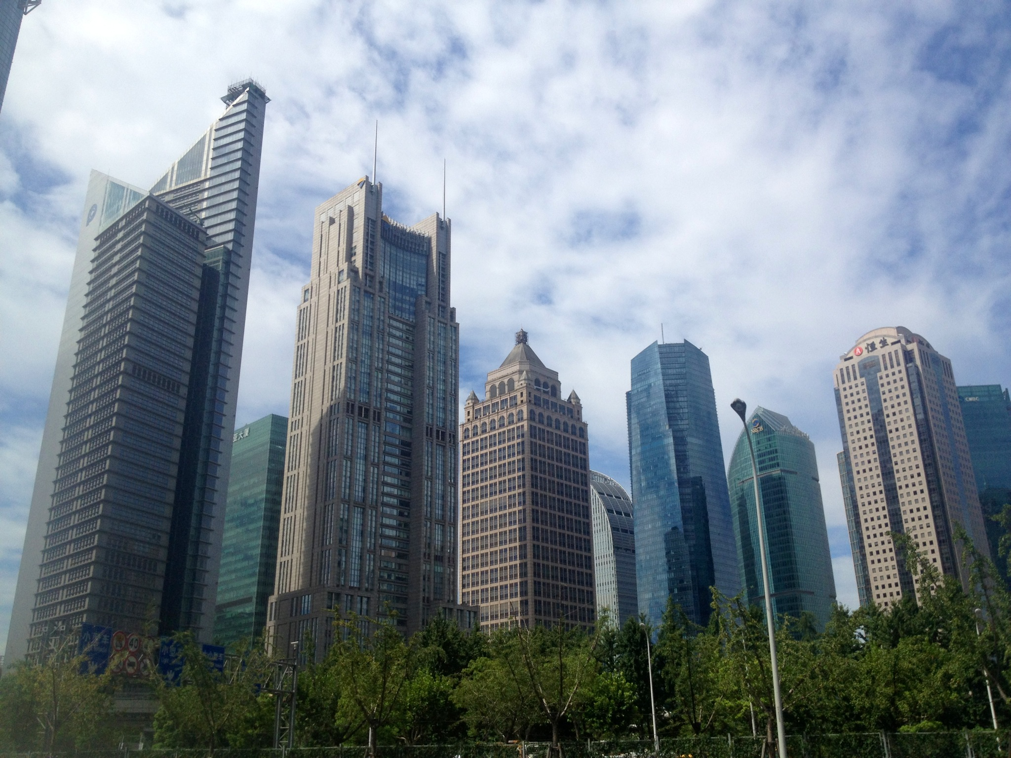 2013年8月3日上海陆家嘴